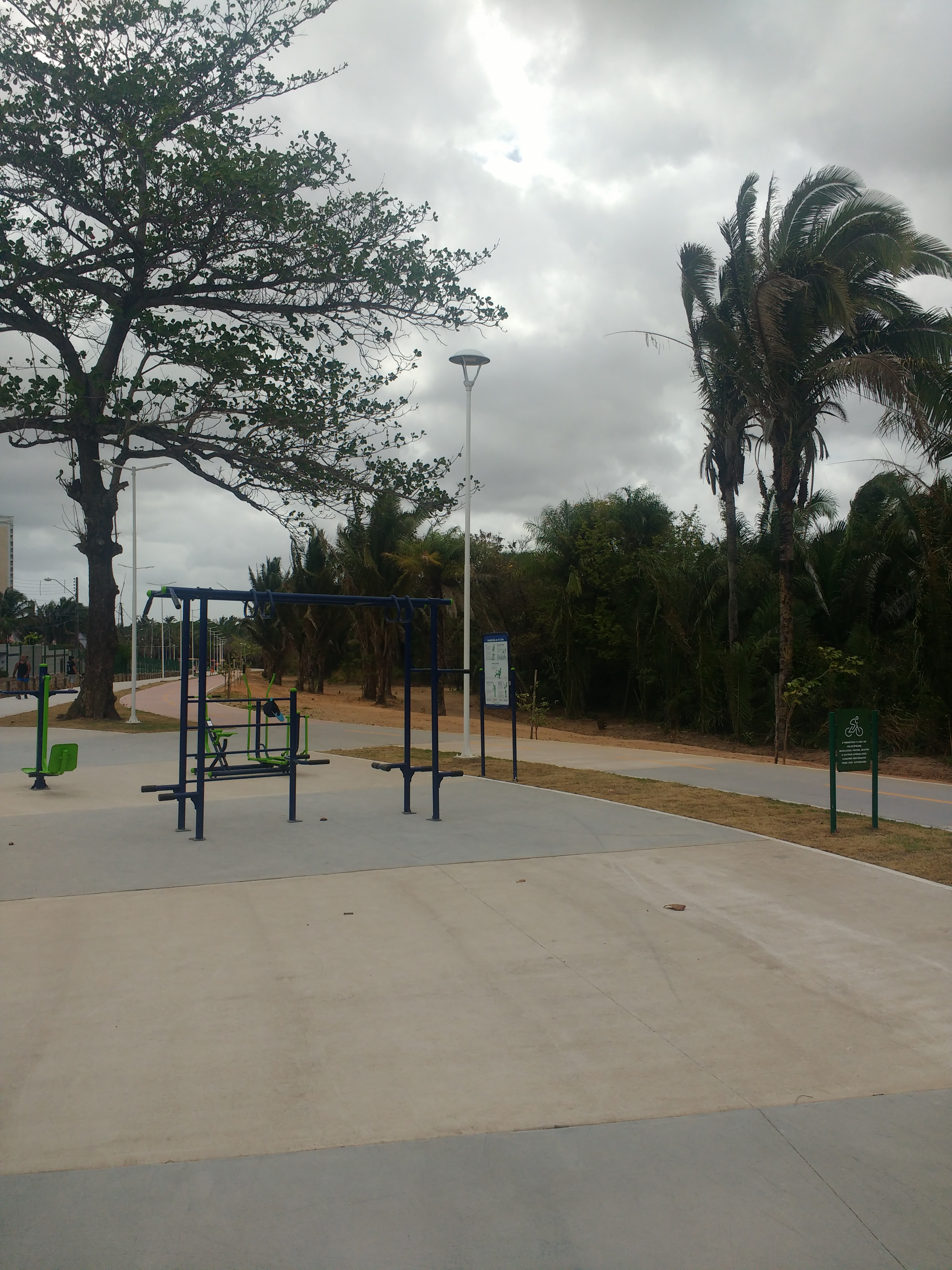 Parque Estadual do Rangedor